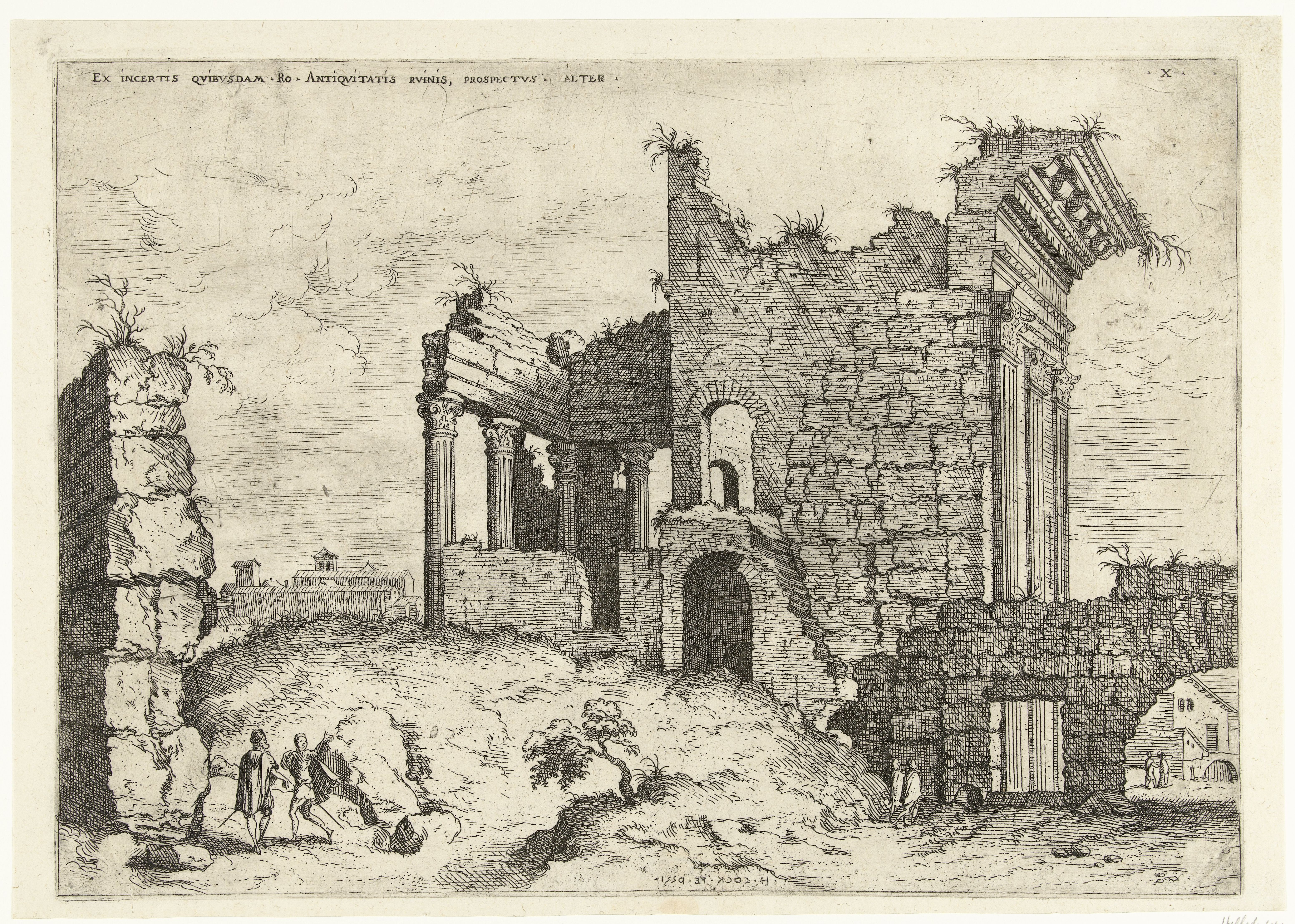 IdentificatieTitel(s): Tweede gezicht op het Forum NervaEx incertis qvibvsdam Ro Antiqvitatis rvinis (...) (titel op object)Romeinse ruïnes (serietitel)Objecttype: prent Objectnummer: RP-P-1882-A-6458Catalogusreferentie: Riggs 23Hollstein Dutch 44Opschriften / Merken: verzamelaarsmerk, verso, gestempeld: Lugt 2228Omschrijving: Tweede gezicht op de ruïnes van het Forum Nerva te Rome. In het midden de Tempel van Minerva. Prent uit een serie van 25 prenten met Romeinse ruïnes.VervaardigingVervaardiger: prentmaker: Hieronymus Cock (vermeld op object)naar eigen ontwerp van: Hieronymus Cockuitgever: Hieronymus CockPlaats vervaardiging: AntwerpenDatering: 1550 en/of 1551Fysieke kenmerken: etsMateriaal: papier Techniek: etsenAfmetingen: plaatrand: h 230 mm × b 326 mmOnderwerpWat: ruin of a building ~ architectureWaar: Forum van NervaTempel van Minerva MedicaVerwerving en rechtenVerwerving: aankoop nov-1882Copyright: Publiek domein